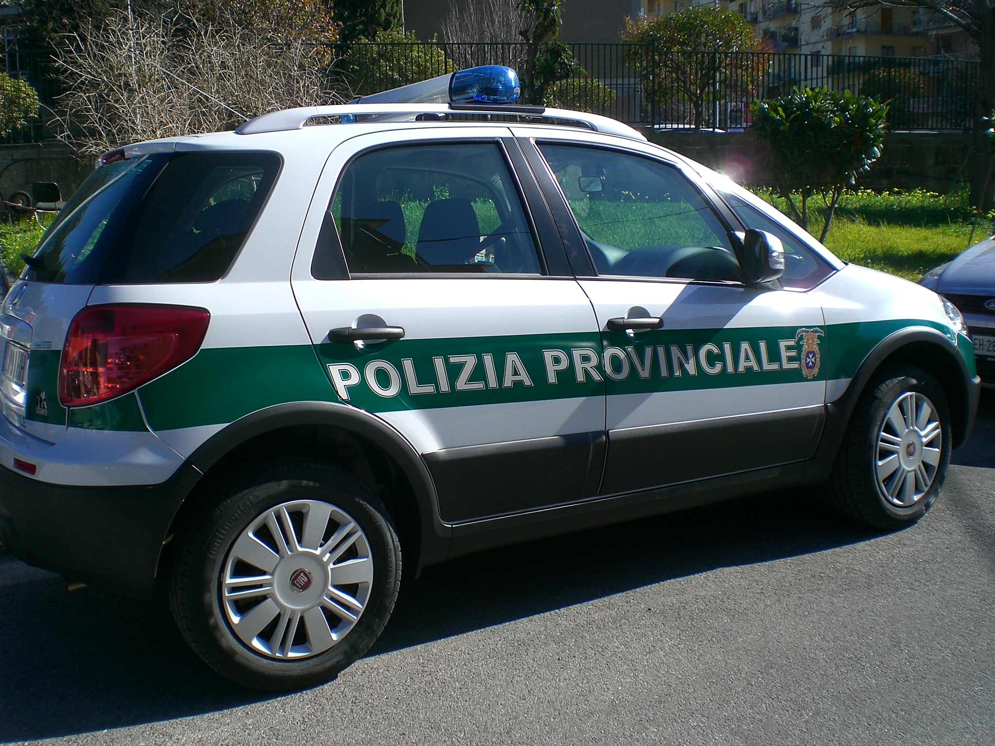 Auto della Polizia Provinciale